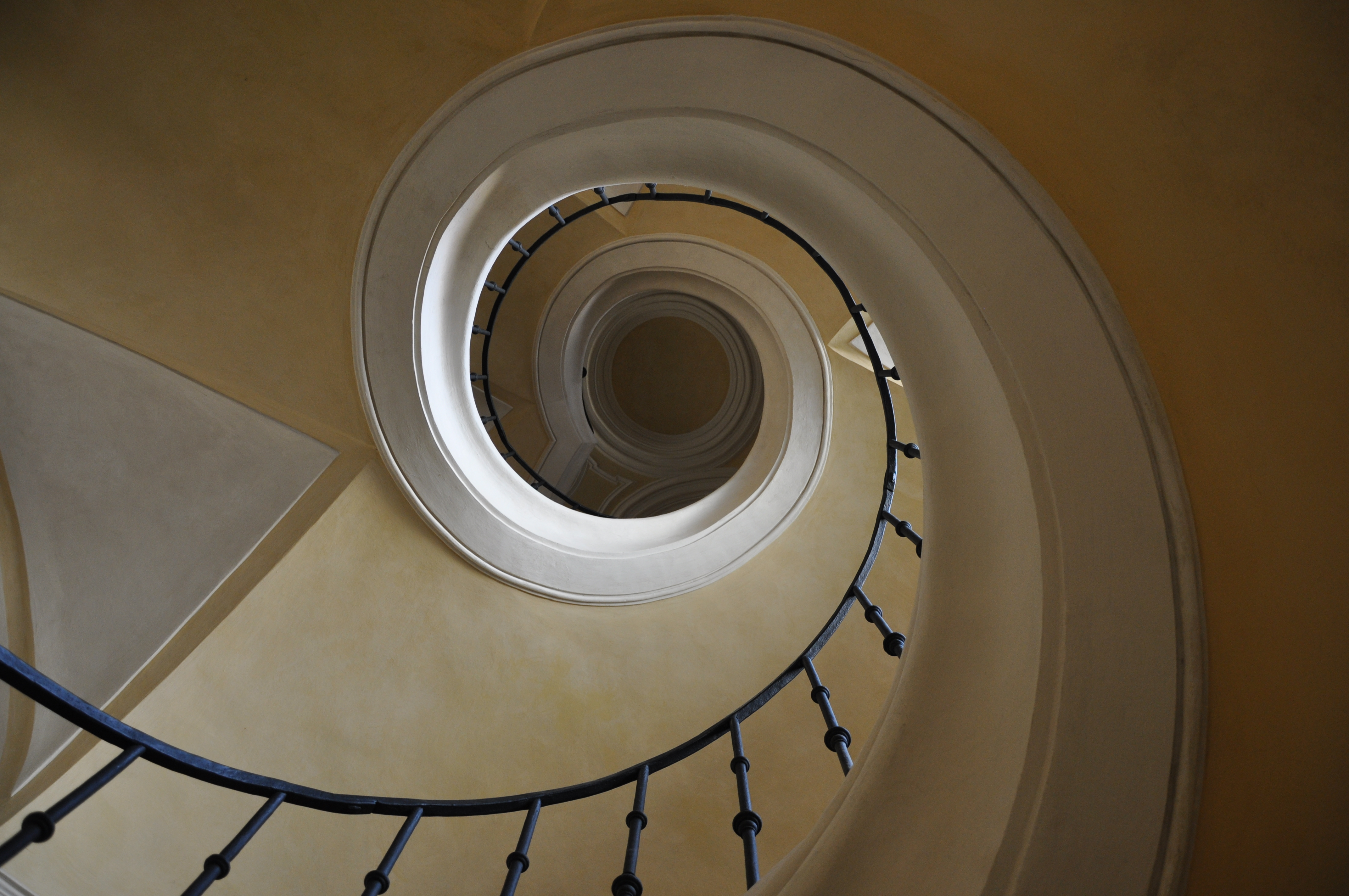 Schodiště v Sedlci u Kutné Hory, Česká republika.